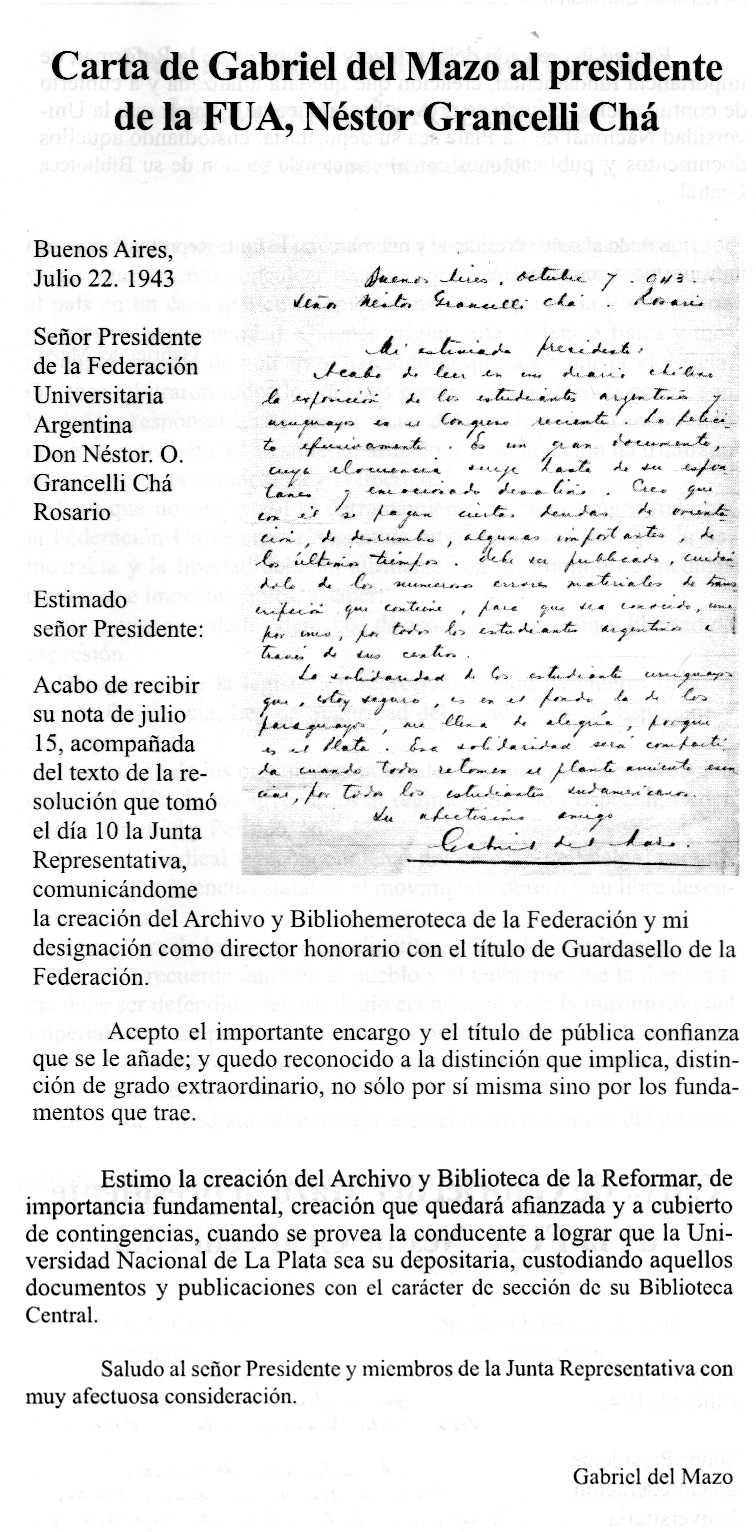 Carta del Ingeniero y prohombre de la Reforma del '18 Gabriel del Mazo al entonces Presidente de la Federación Universitaria Nestor Grancelli Cha.